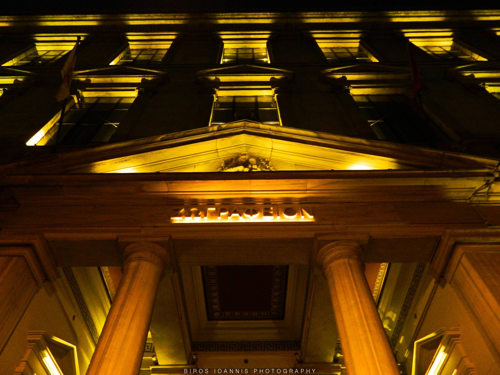 Ζωγραφειον Λυκειο Προσοψη κτηριου